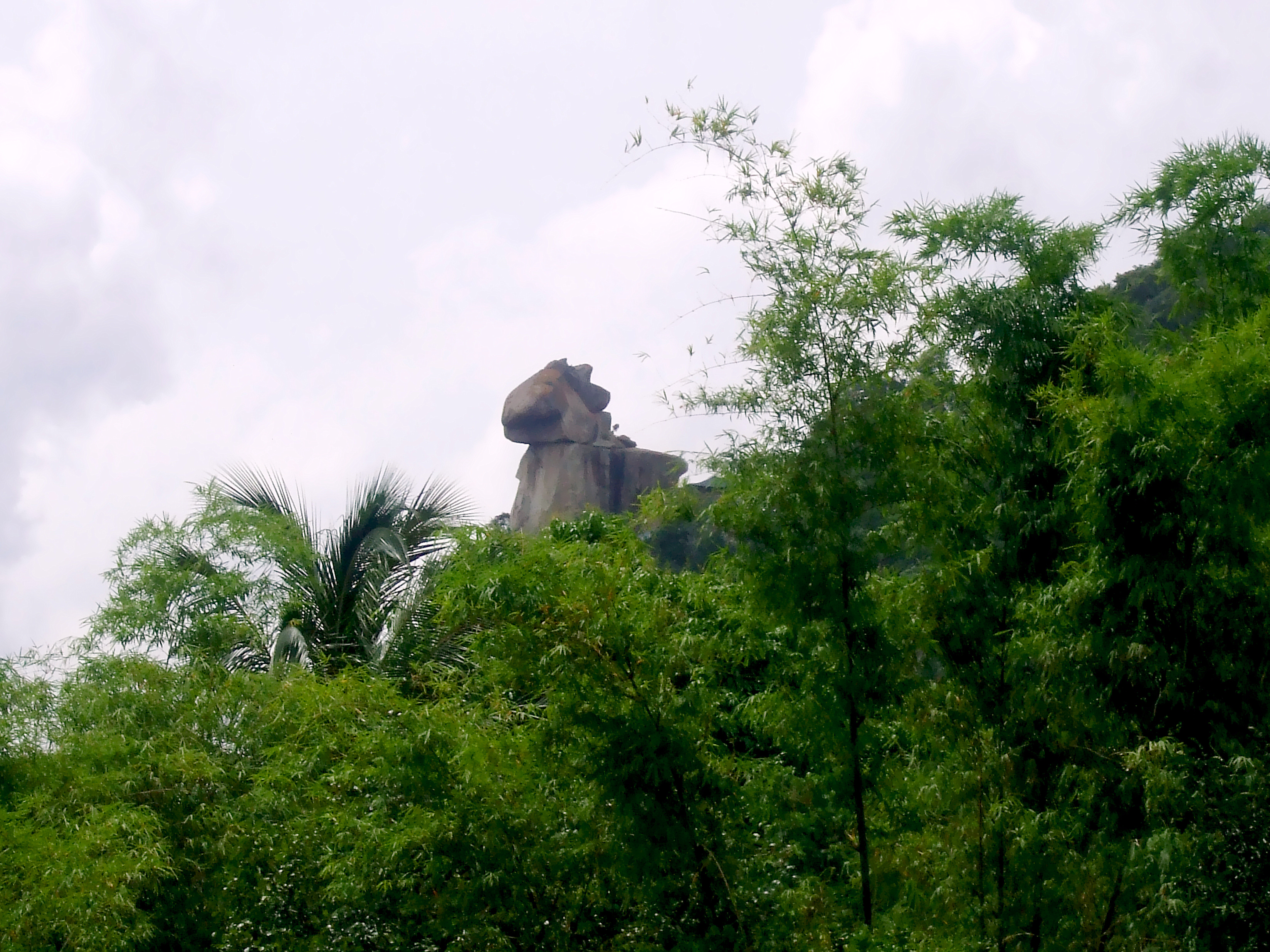 Tảng đá lớn có hình dạng giống con chim két trên đỉnh núi Két, thuộc xã Thới Sơn, huyện Tịnh Biên, An Giang, Việt Nam.